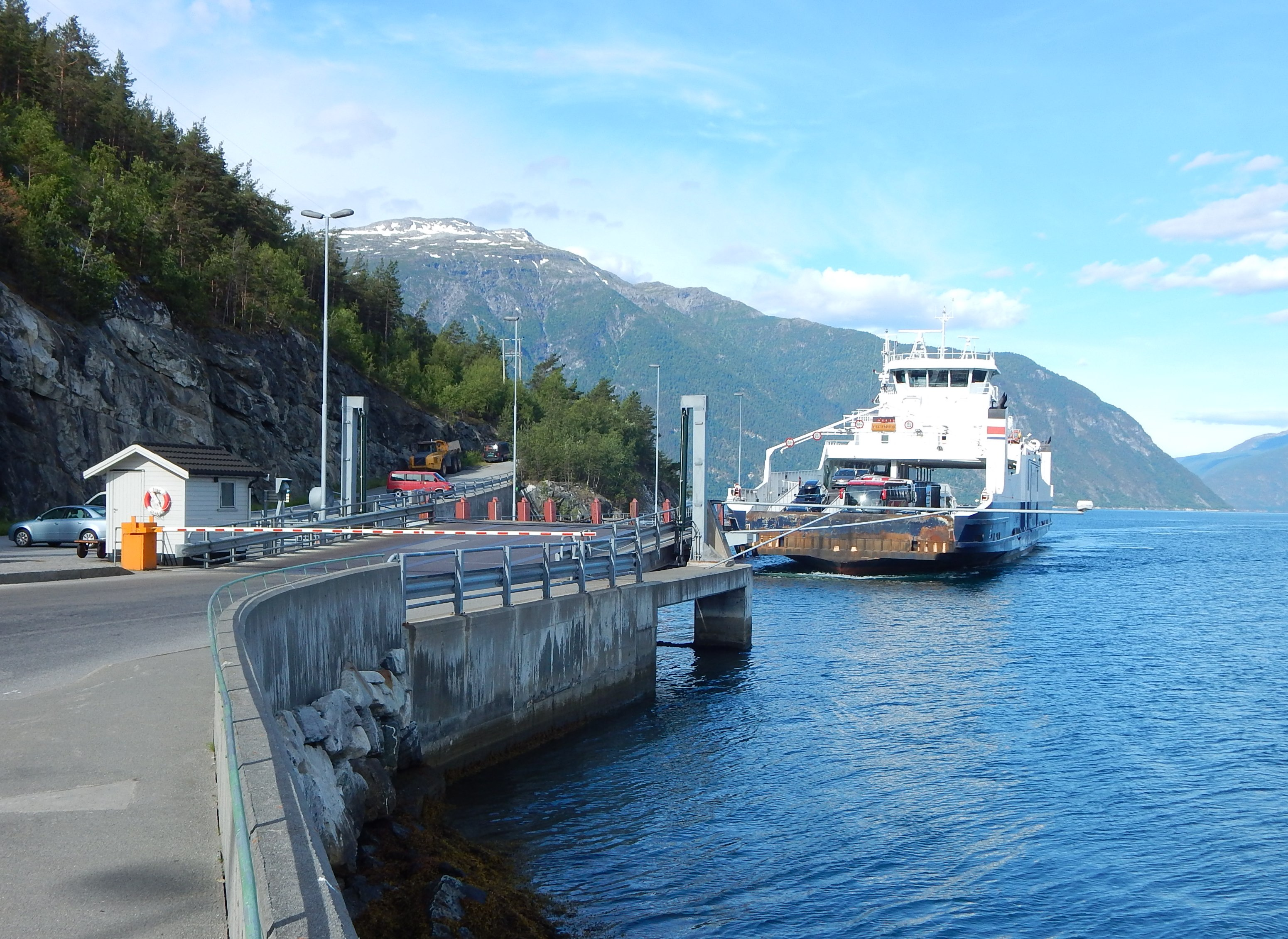 MF Lifjord ved Fodnes